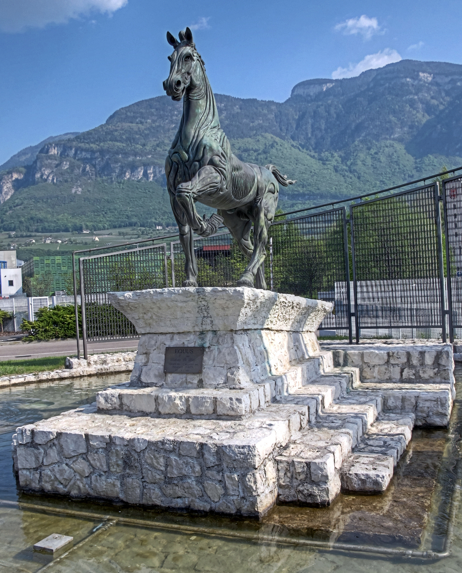 Italien, Südtirol, Neumarkt, Equus/Pferde-Denkmal/Brunnen, gestiftet 1992 von der Firma Würth, gestaltet von De Luigi, HDR-Image